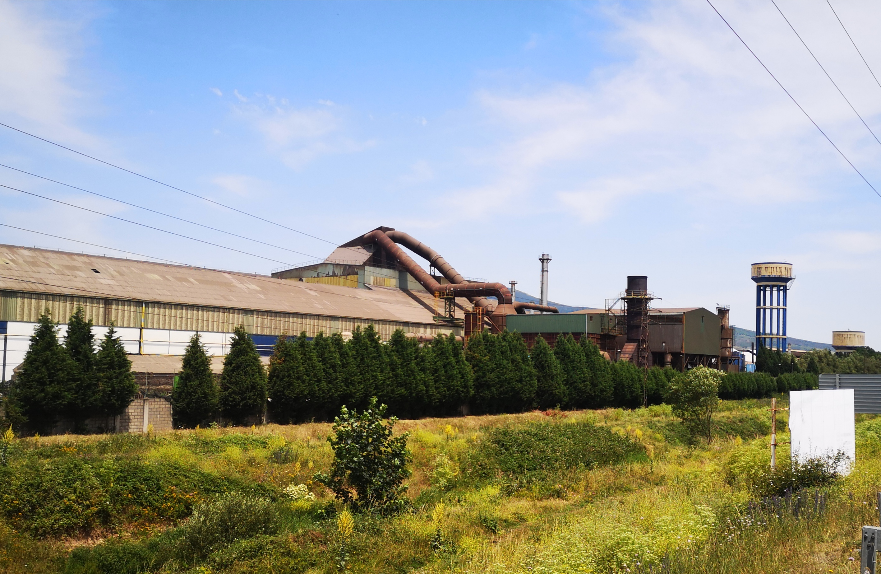 Aspecto exterior de la factoria siderúrgica La Naval en Reinosa (España)